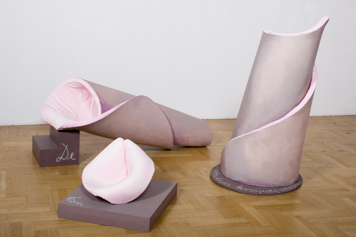 "De-Kon-Strukcja Krzywej Wieży" - by Maria Pinińska-Bereś, from permanent collection of Zachęta National Gallery of Art (Warsaw, Poland)